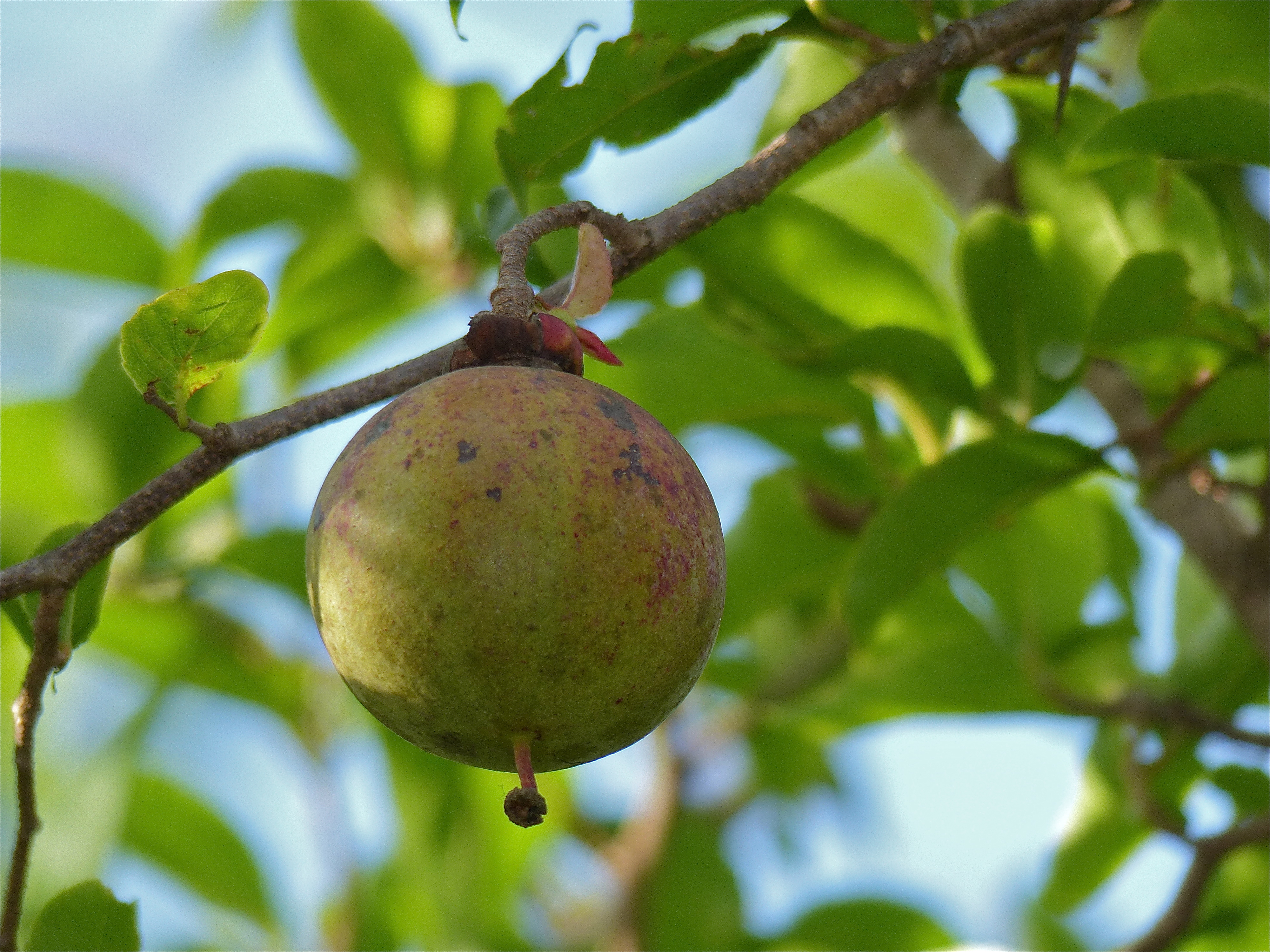 Lower Sabie Camp, Kruger NP, SOUTH AFRICA